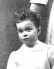 Retratos de la infanta María Teresa de Borbón y Habsburgo-Lorena con su hijos nacidos hasta entonces, publicado en enero de 1912. En la fotografía grande, se le puede ver con sus dos hijos varones, Fernando y Luis Alfonso. En la pequeña, sostiene en brazos a su hija menor, María Mercedes. La infanta tendría una segunda hija poco después y murió ese mismo año.